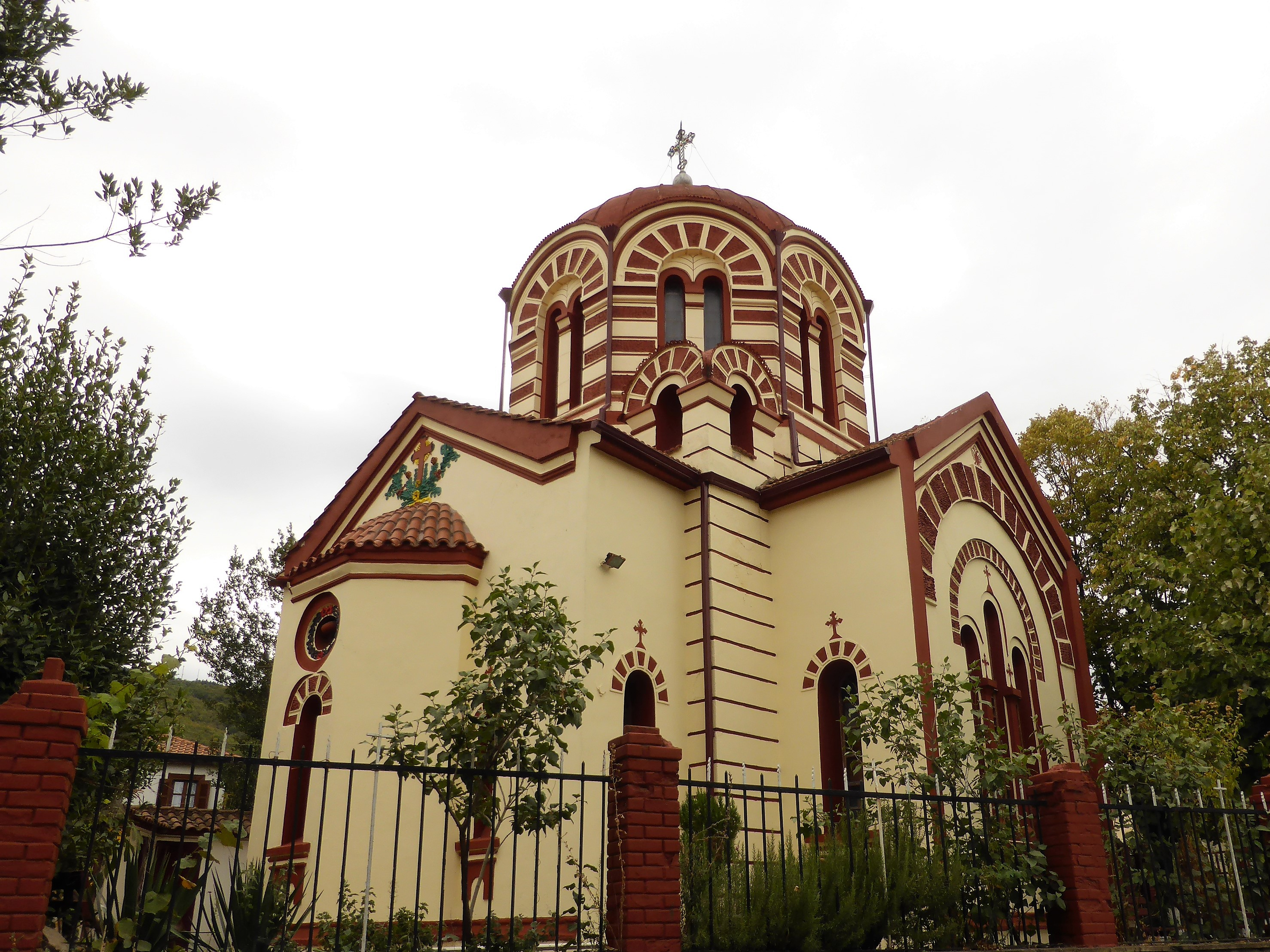 Kirche in Arnea, Chalkidiki, Griechenland.